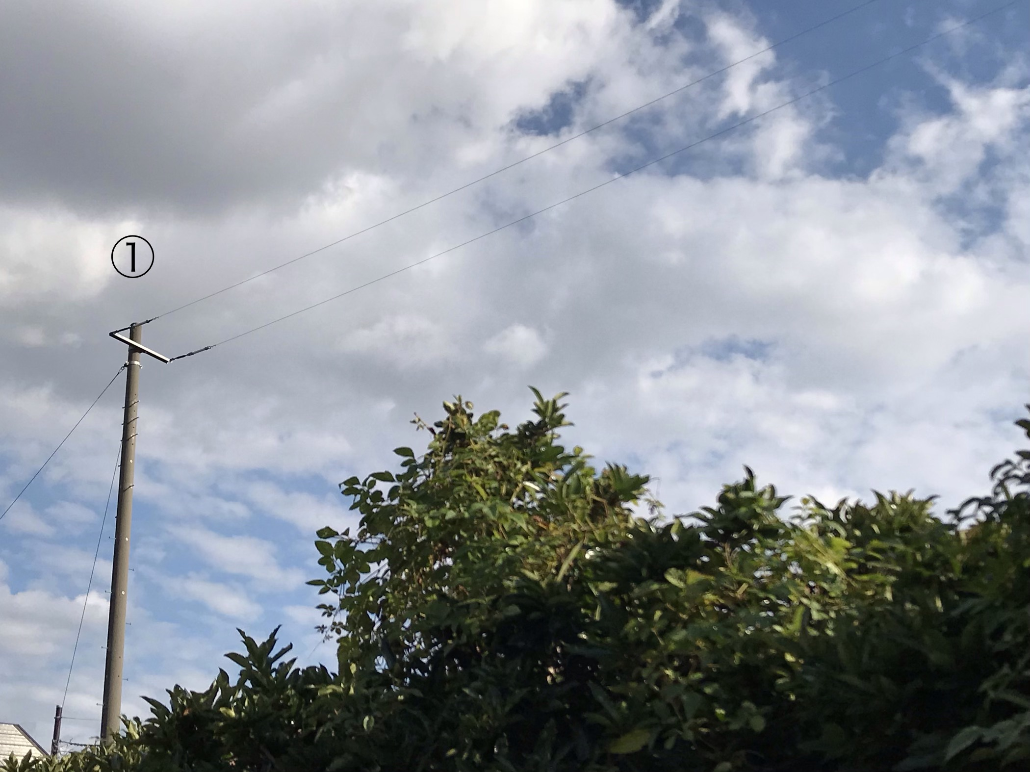 右手の主鉄塔から伸びるアンテナワイヤーの終端部。丸数字は撮影者が加筆。